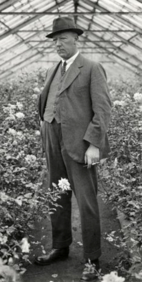 Cricket, De bekende Haarlemse cricket-speler Carst Jan Posthuma viert zijn zilveren jubileum, en er werd hem het ere-lidmaatschap van de Nederlandse Cricketbond aangeboden. Posthuma speelde voor Nederland, Rood/Wit en London County. Foto Posthuma in een bloemenkas temidden van rozen met een sigaret en pijpje, 1920.